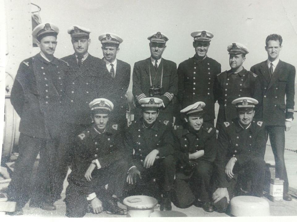 Sr. D., Francisco Javier de Elizalde y Laínez, Capitán de Fragata, comandante del destructor "Almirante Miranda", en zafarrancho de combate frente la costa de Agadir, guerra de Sidi-Ifni. Aparece en el centro de la fila superior, con la oficialidad del barco, en diciembre de 1957